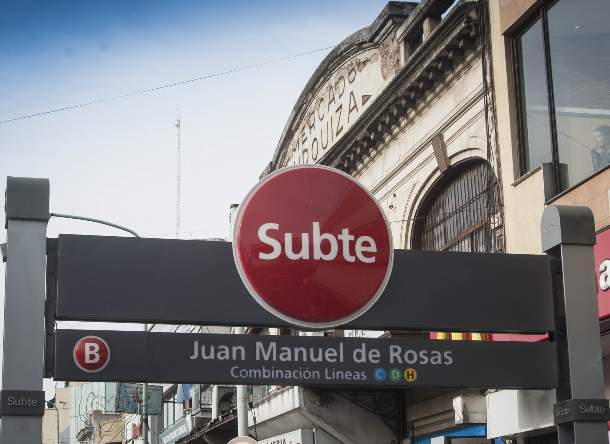 entrada a la estación Juan Manuel de Rosas, Línea B del Subte de Buenos Aires